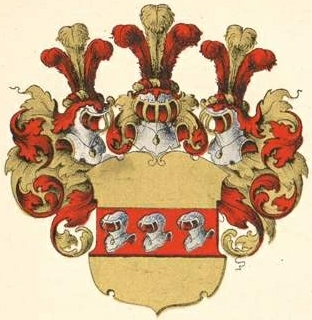 Schillingi suguvõsa vabahärravapp